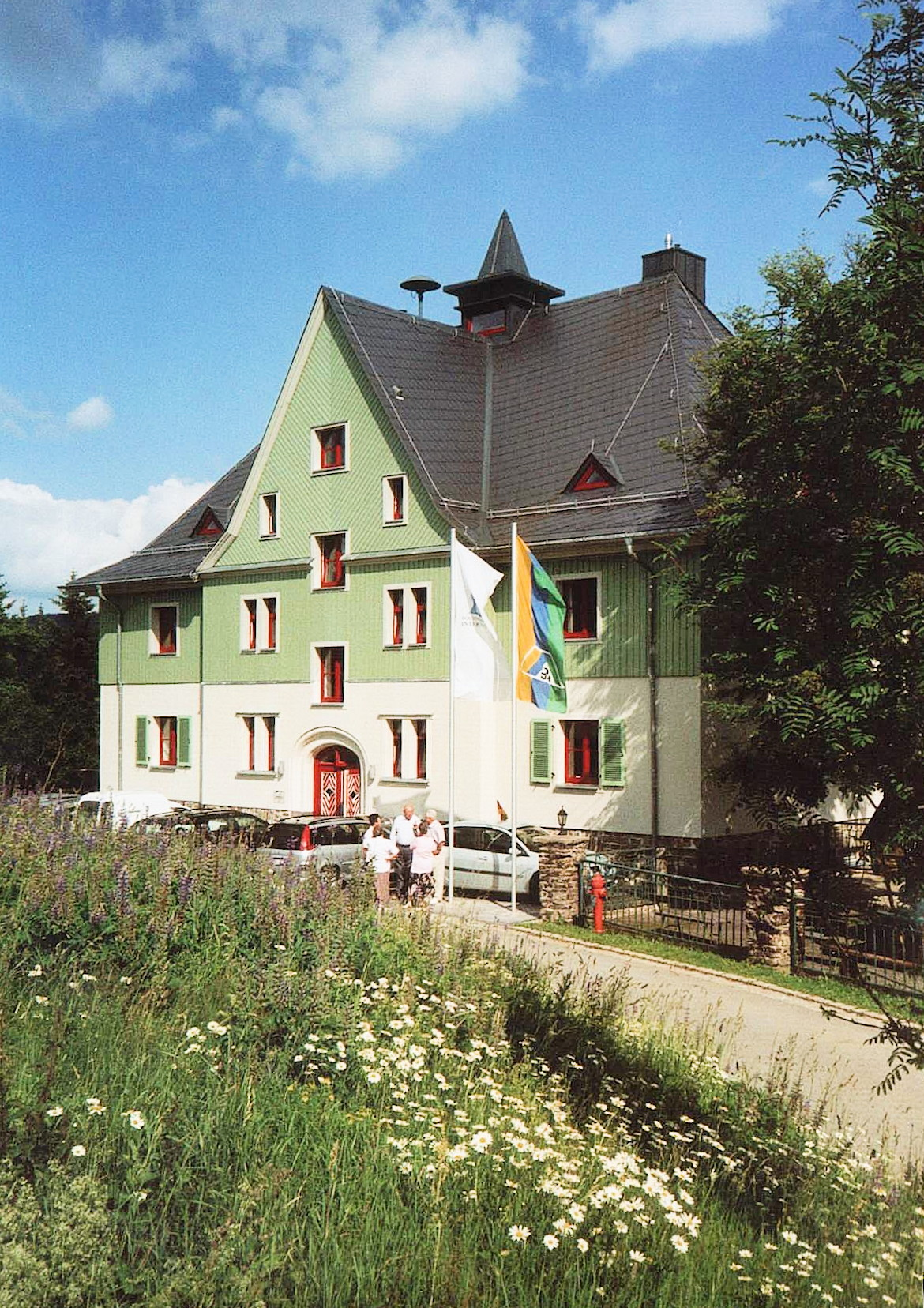 Jugendherberge Johanngeorgenstadt Selbst fotografiert